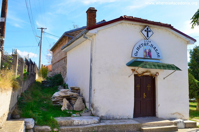 Црква Св.Петар и Павле, Варош-Прилеп,црква во селото Варош, непоссредно до Прилеп, изградена некаде околу 14 век